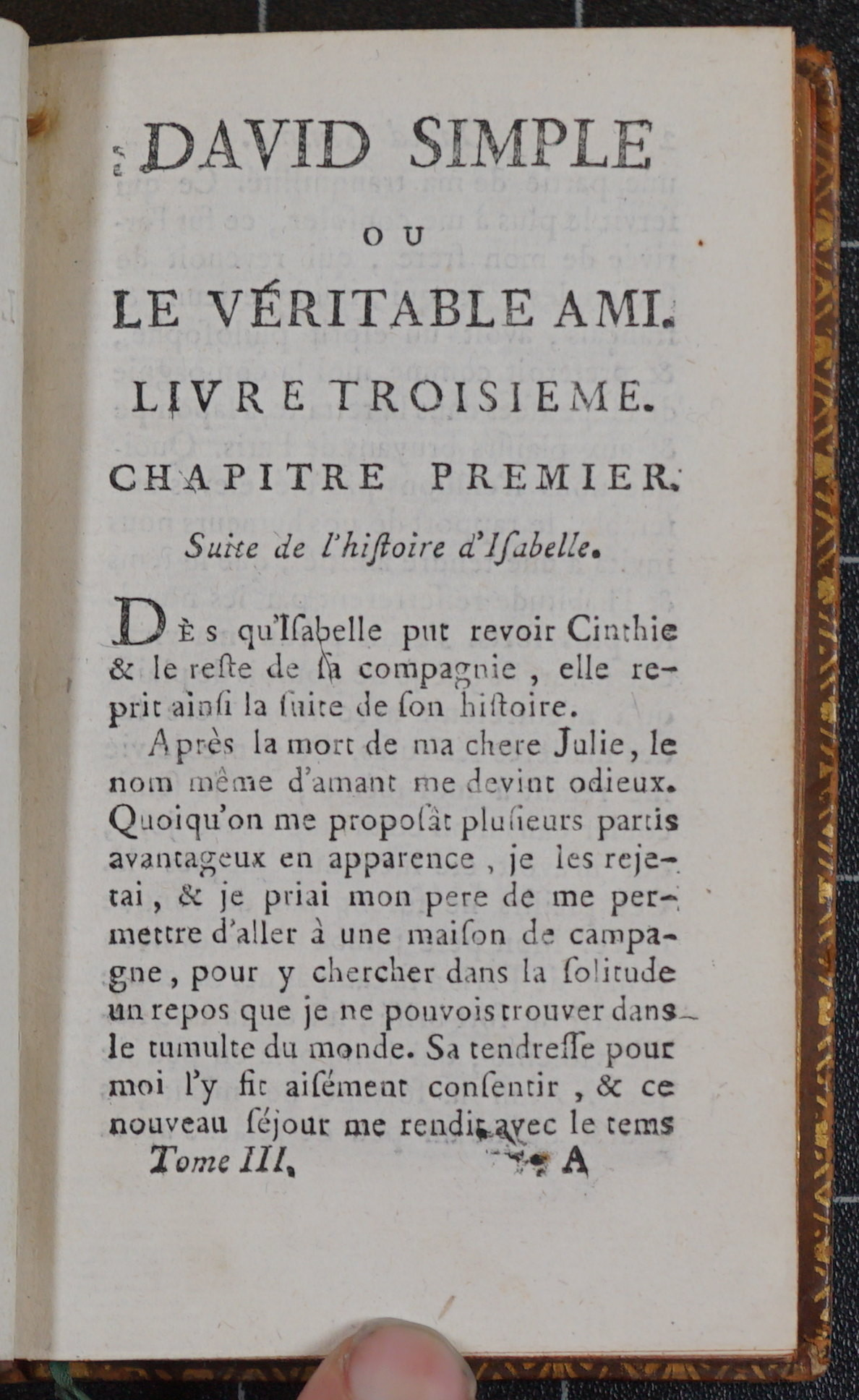 "David Simple, ou le véritable ami". Tome troisième.